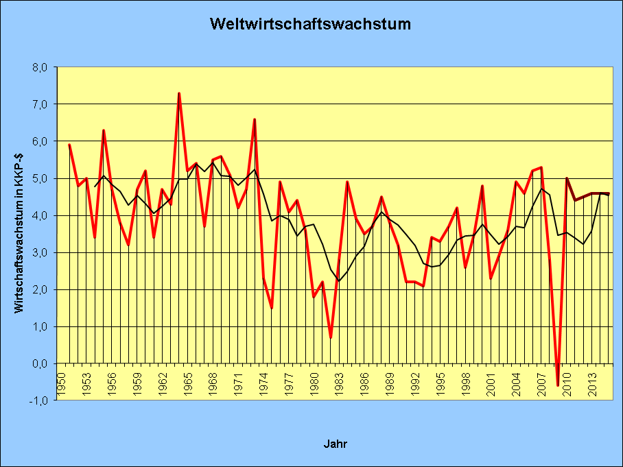 Reales Wirtschaftswachstum von 1950-2008 (Mit Prognose bis 2014) der Erde (schwarze Linie: 5-jährlicher laufender Durchschnitt)